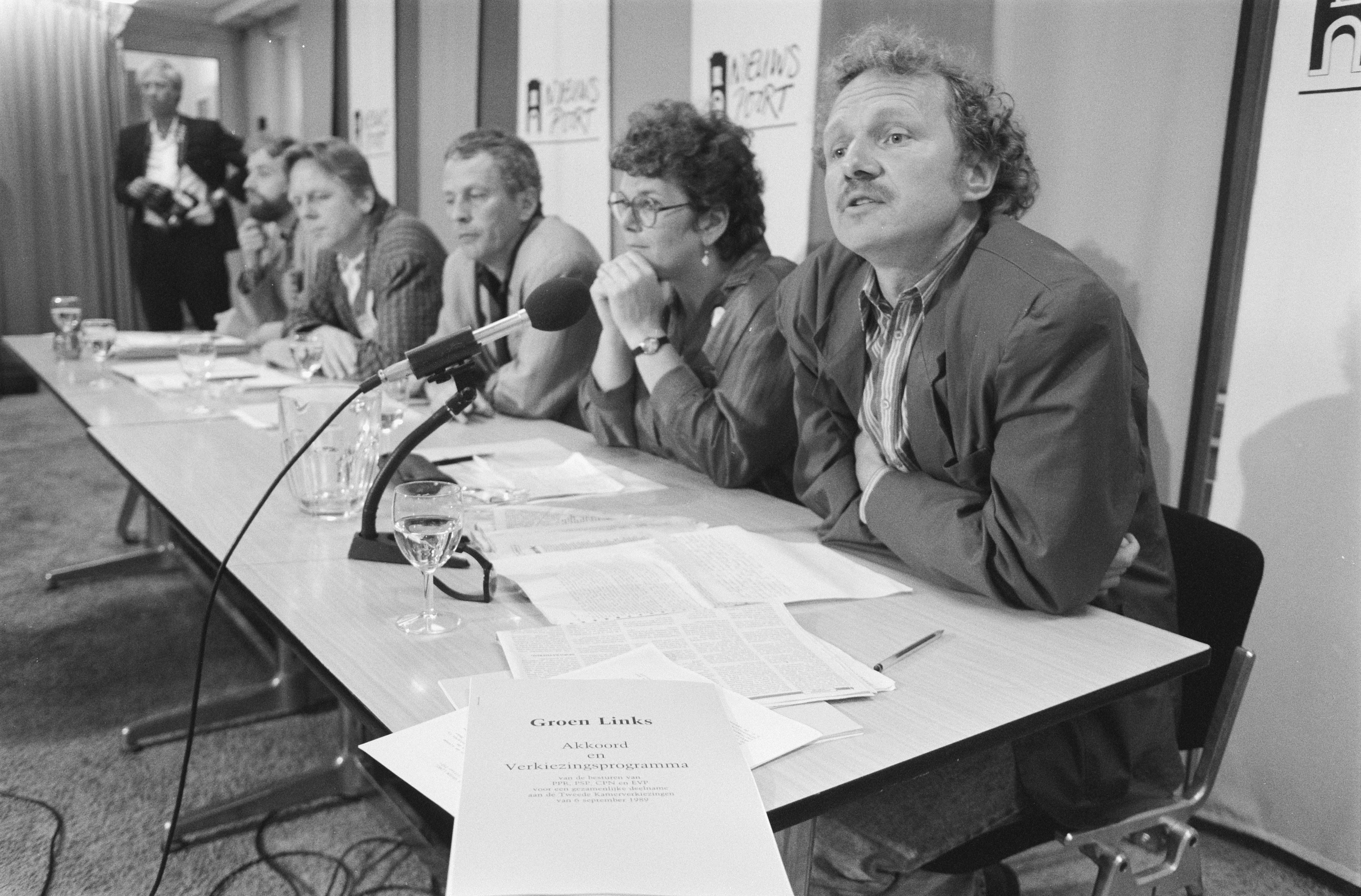 Collectie / Archief : Fotocollectie Anefo Reportage / Serie : Presentatie van het concept verkiezingsprogramma van Groen Links in Den Haag Beschrijving : Afma (EVP), Platvoet (PSP), Branderhorst (PSP), Izeboud (CPN) en van Ojik (PPR) Datum : 30 mei 1989 Locatie : Den Haag, Zuid-Holland Trefwoorden : concepten, presentaties, verkiezingen Persoonsnaam : Branderhorst, Henk, Izeboud, Elli, Ojik, Bram van, Platvoet, Leo Instellingsnaam : CPN, PPR Fotograaf : Croes, Rob C. / Anefo Auteursrechthebbende : Nationaal Archief Materiaalsoort : Negatief (zwart/wit) Nummer archiefinventaris : bekijk toegang 2.24.01.05 Bestanddeelnummer : 934-4624